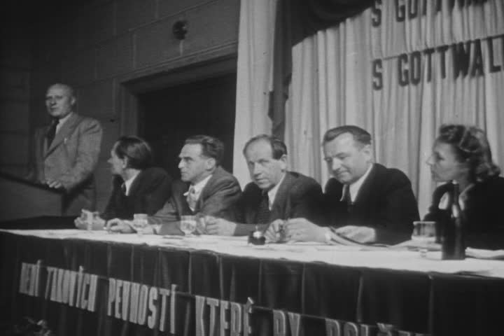 Klement Gottwald, záběr z amerického filmového týdeníku "The March of Time".